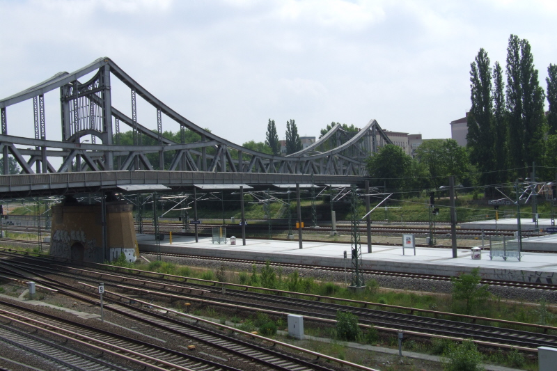 Die Swinemünder Brücke in Berlin-Gesundbrunnen Architektur: Bruno Möhring und ... Baujahr: 1905, vereinfachter Wiederaufbau 1954 Fotograf: Harald Rossa Datum: Juni 2006